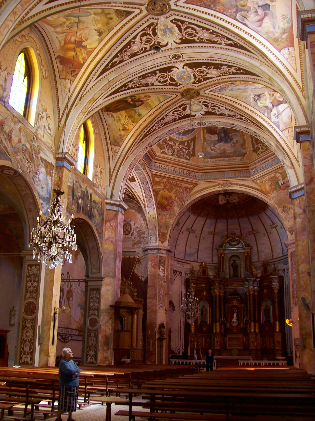 Inside the Templo Parroquial de la Virgen de Aranzazú in Victoria, Entre Ríos, Argentina.